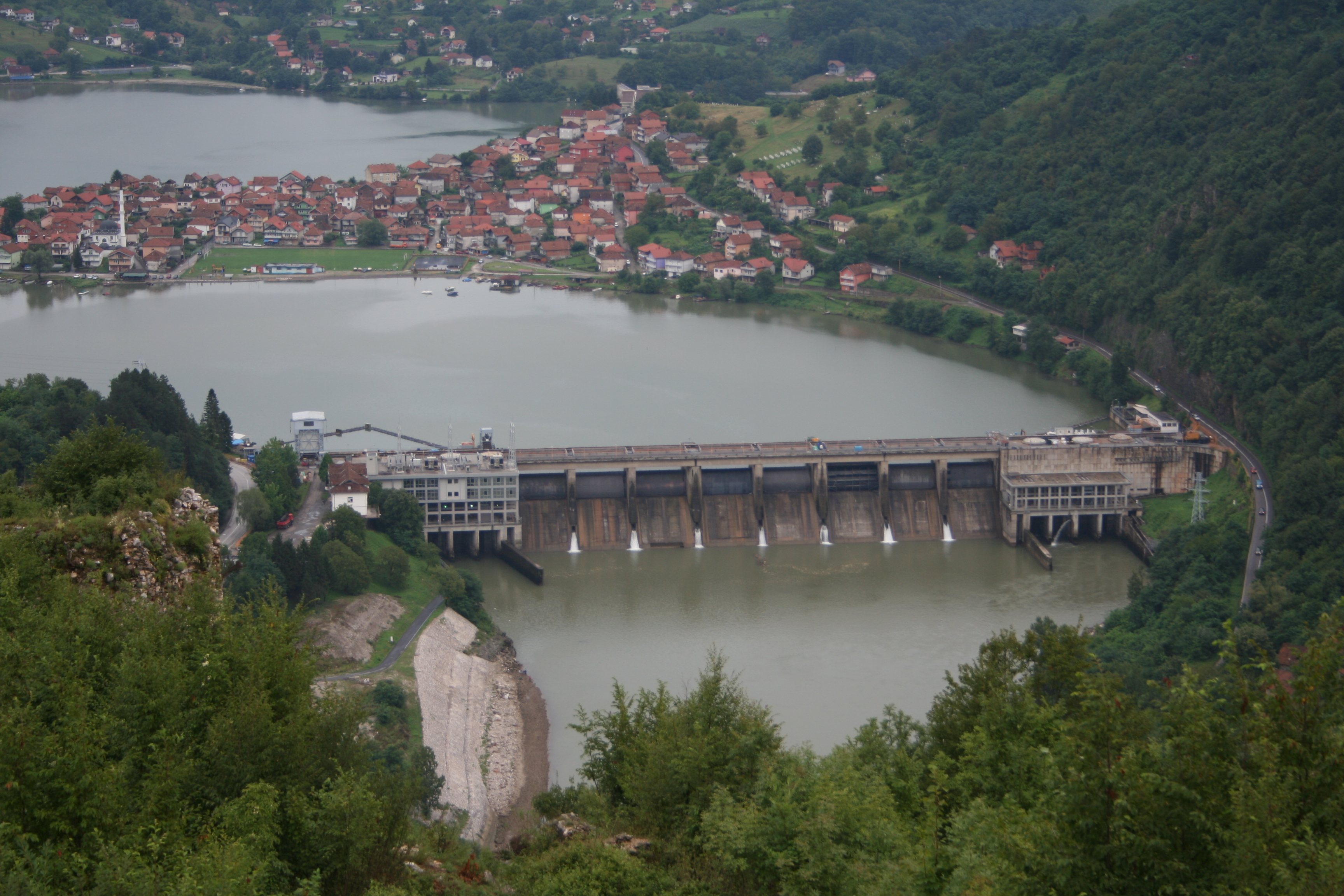 Pogled na Mali Zvornik i HE Drina sa Kule grada u Zvorniku, Republika Srpska